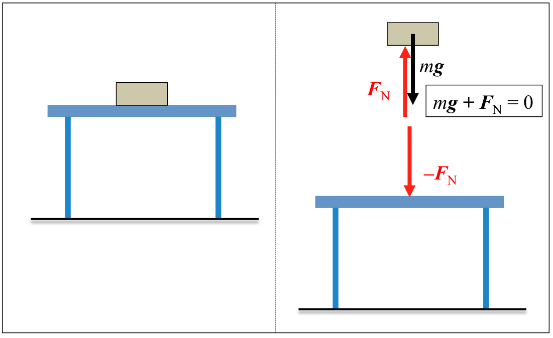 Pisuaren eta indar normalaRen eskema, mahai gainean dagoen kutxaren kasuan.